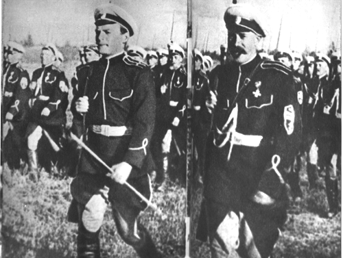 Каппелевцы, «психическая атака» (Кадр из к/ф «Чапаев» 1934 года)